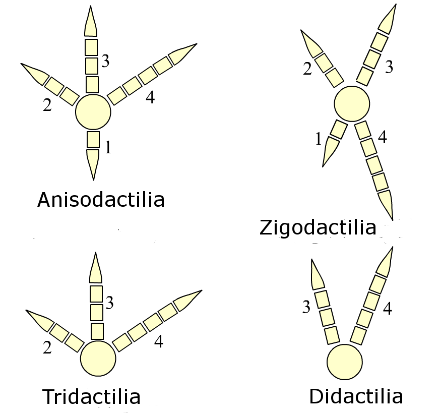 Esquema de las diferentes dactilias en aves